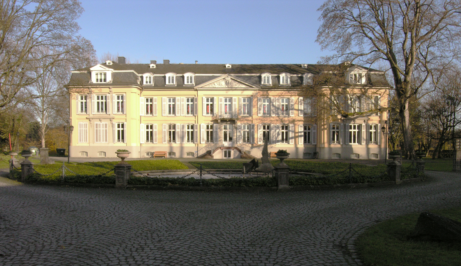 Schloss Morsbroich, Leverkusen, Hauptgebäude